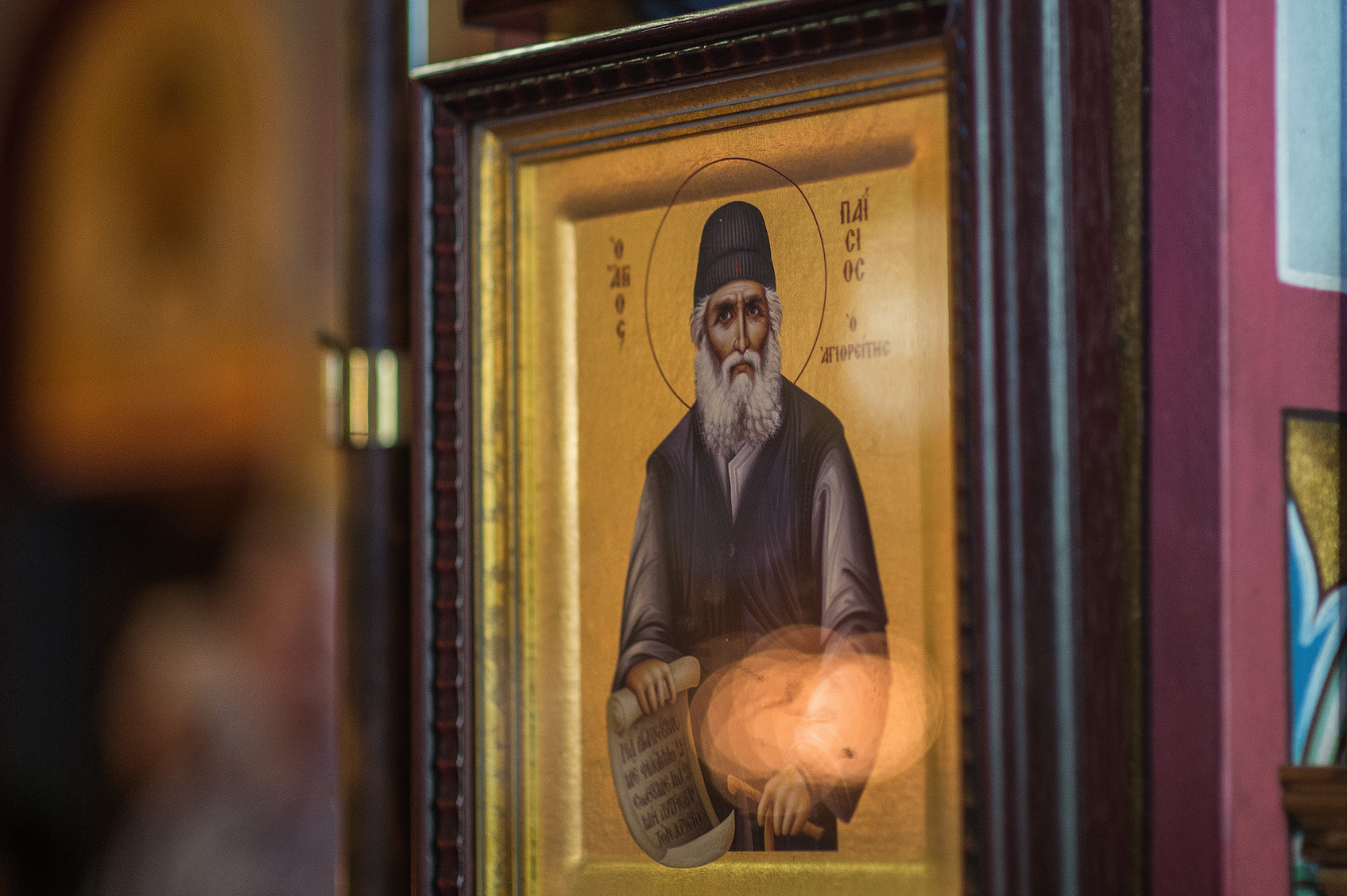 c33098_dd224b62d03f4dee9f54a9d809a6837b-mv2_d_4016_2673_s_4_2